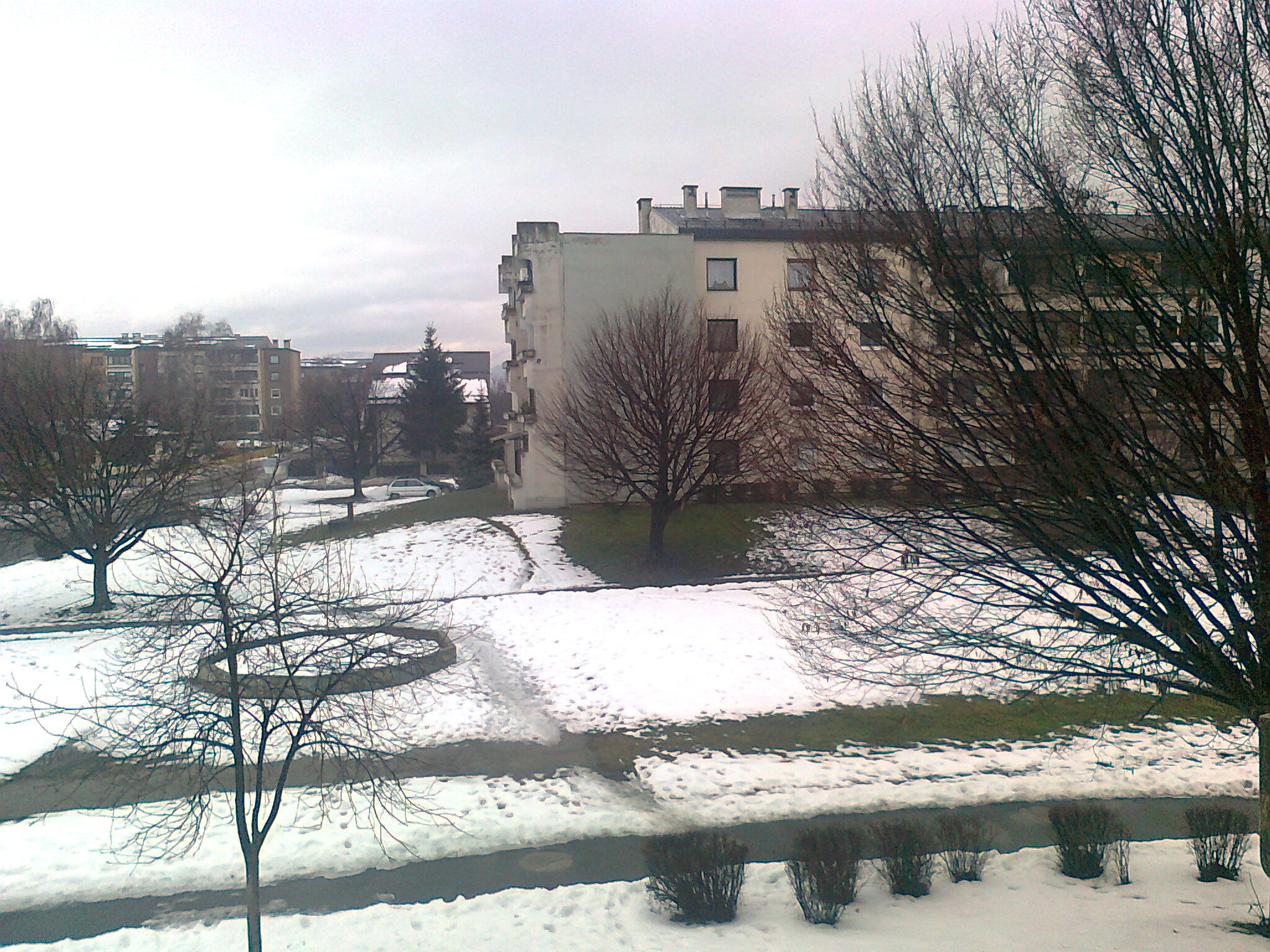 S-31 bloki